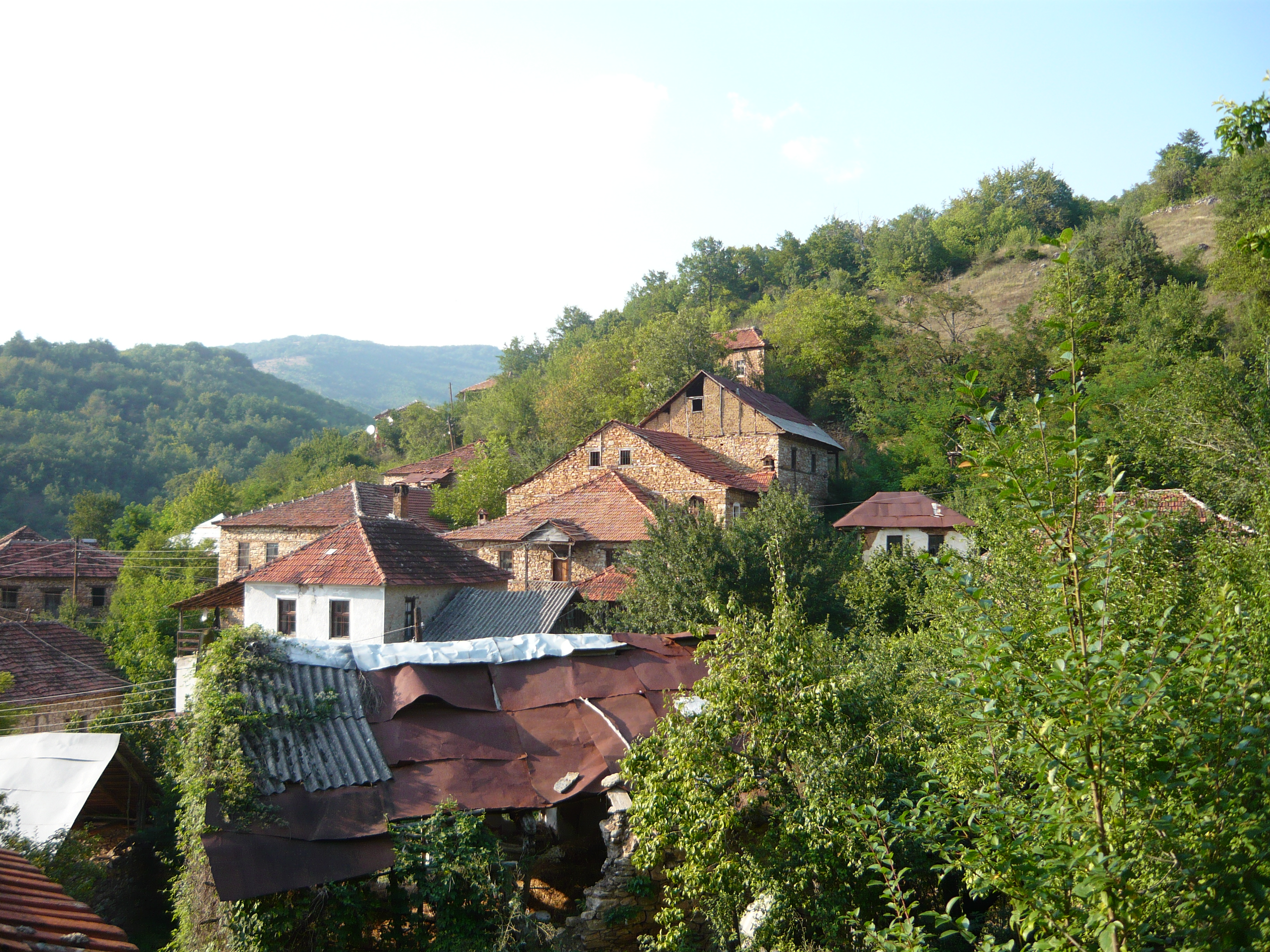 Dolenci, demirhisarsko